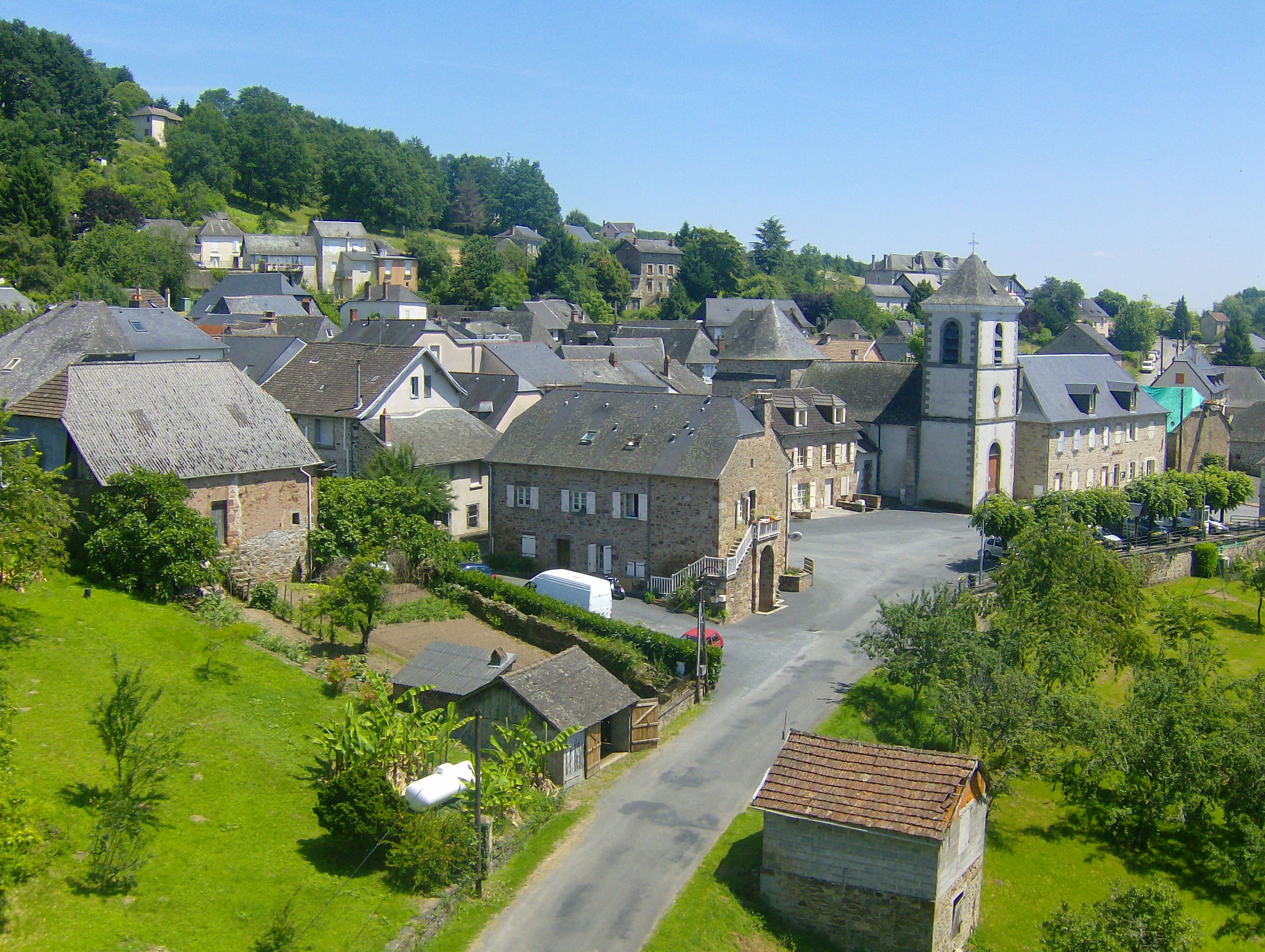 Village de Vignols (Corrèze) vu d'un viaduc de chemin de fer